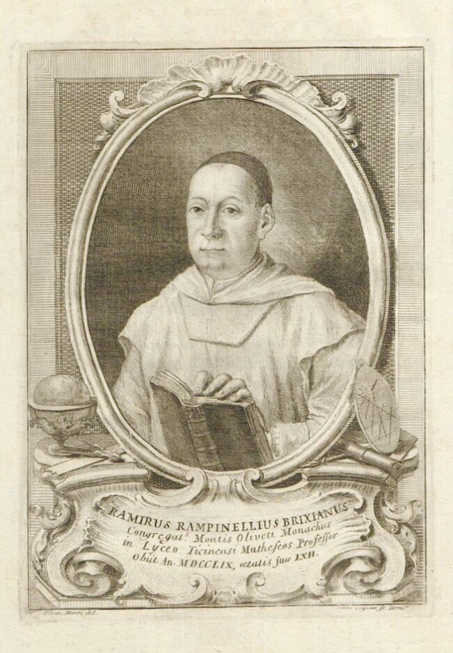 Ramiro Rampinelli